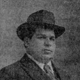 Manuel Salazar conocido como Melico, el mas grande tenor costarricense.